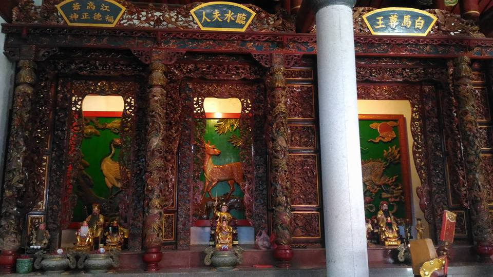 馬祖南竿鄉復興村牛峰境五靈公廟神龕